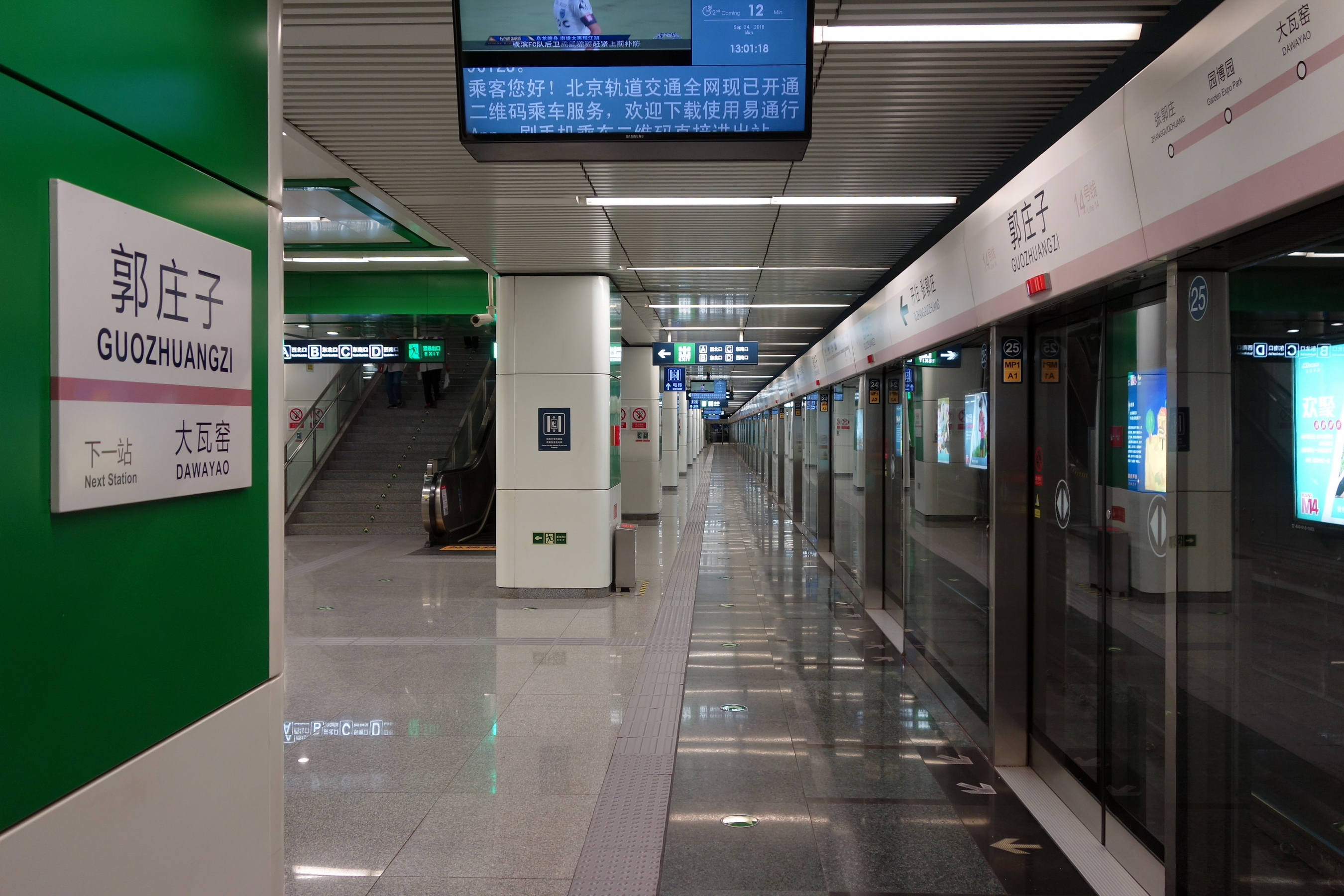 北京地铁14号线郭庄子站站台